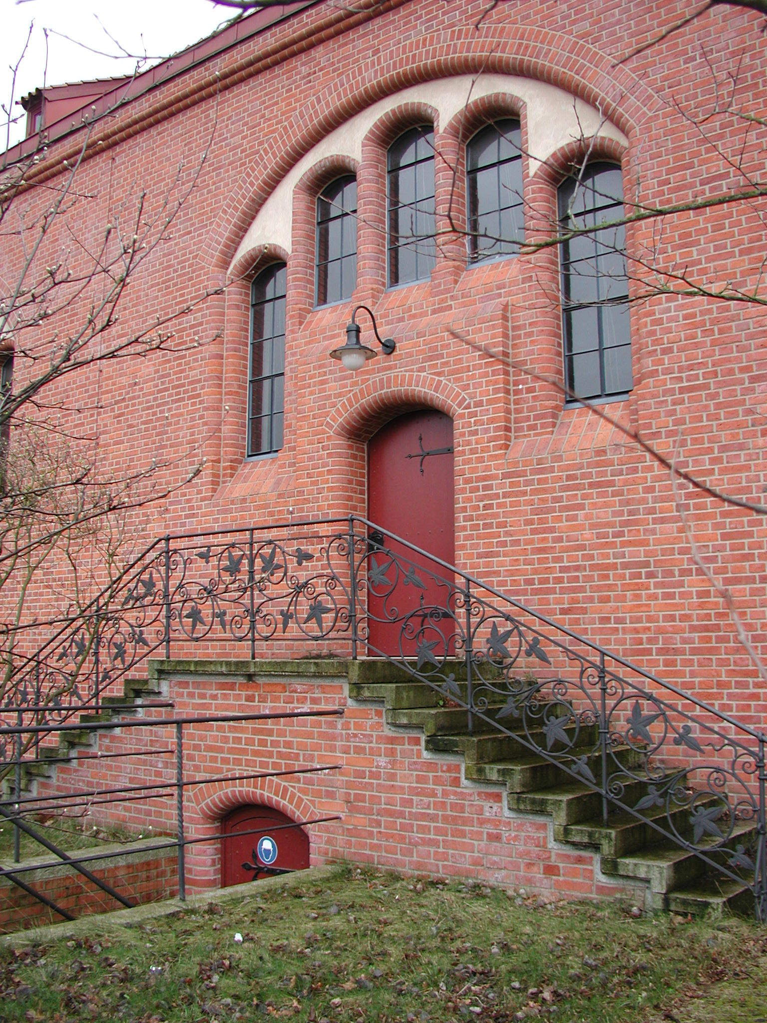 Berlin, Lichtenberg, Landsberger Allee, Wasser-Zwischenpumpwerk: Ansicht eines Maschinenhauses zur Landsberger Allee hin, renoviert